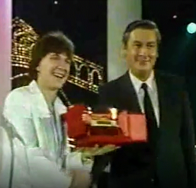 vf